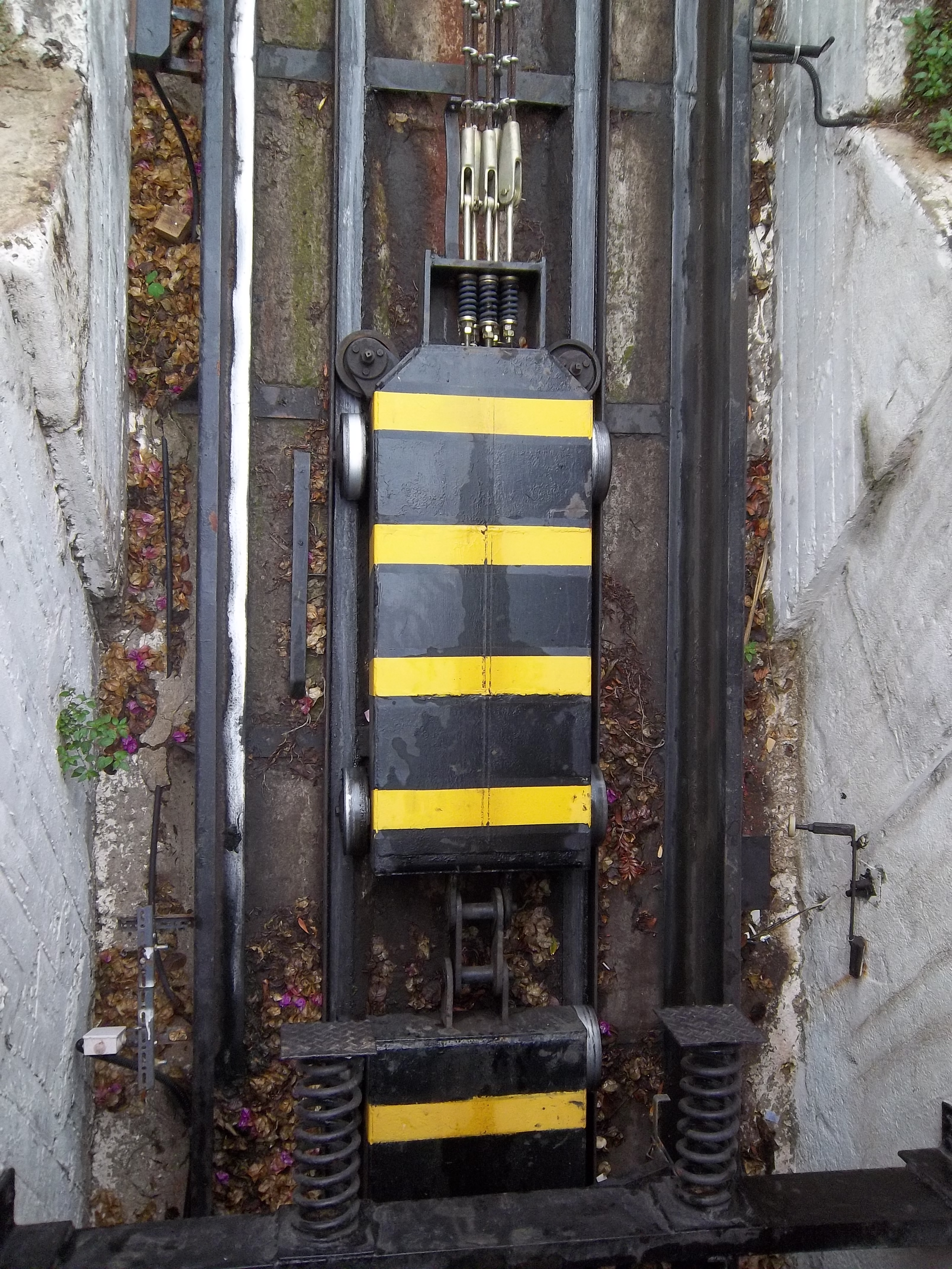 Contrapeso del Funicular Villanelo en Viña del Mar, Región de Valparaíso, Chile.